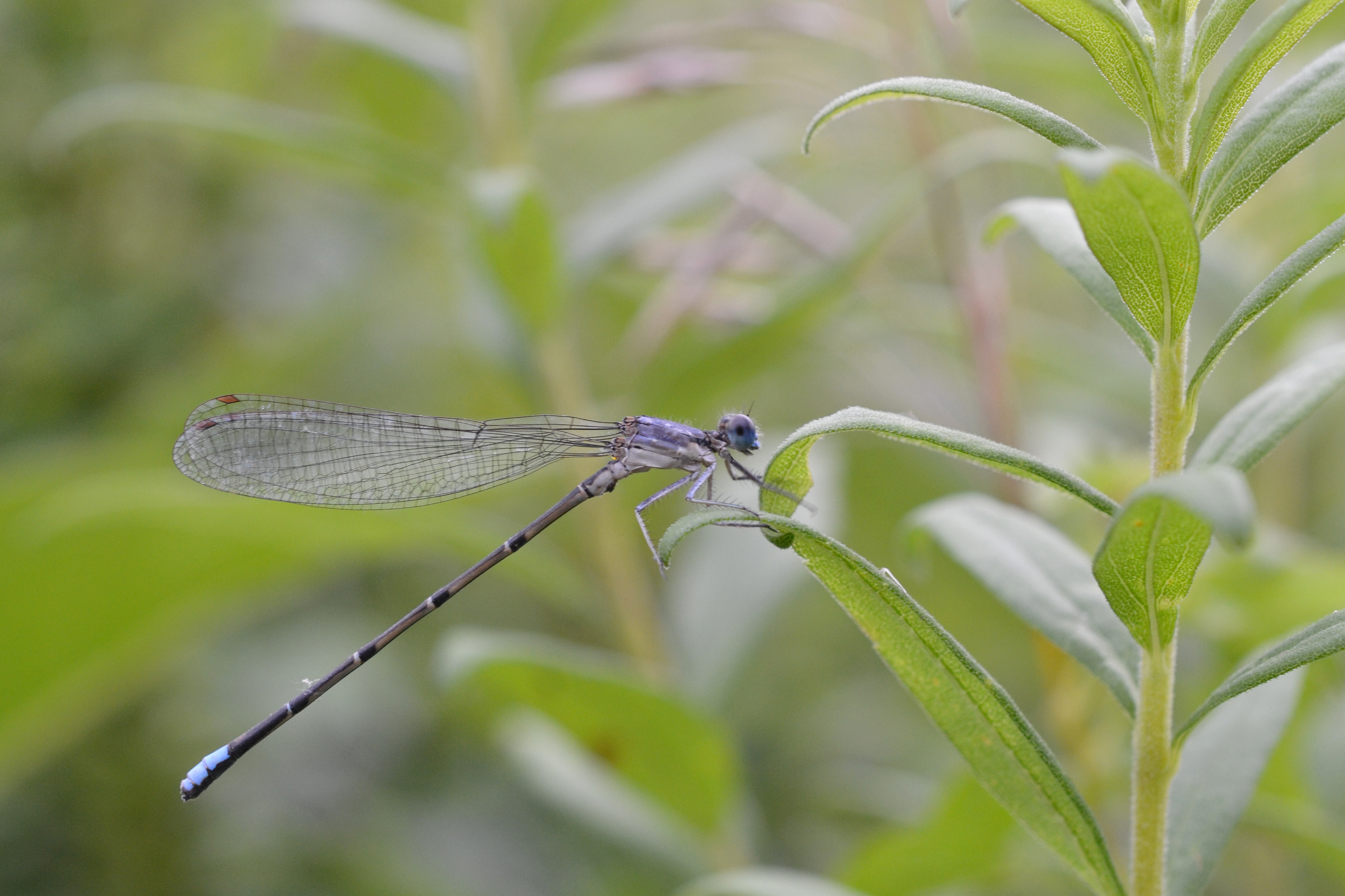 Rentschler Forest Metropark, Fairfield, Ohio